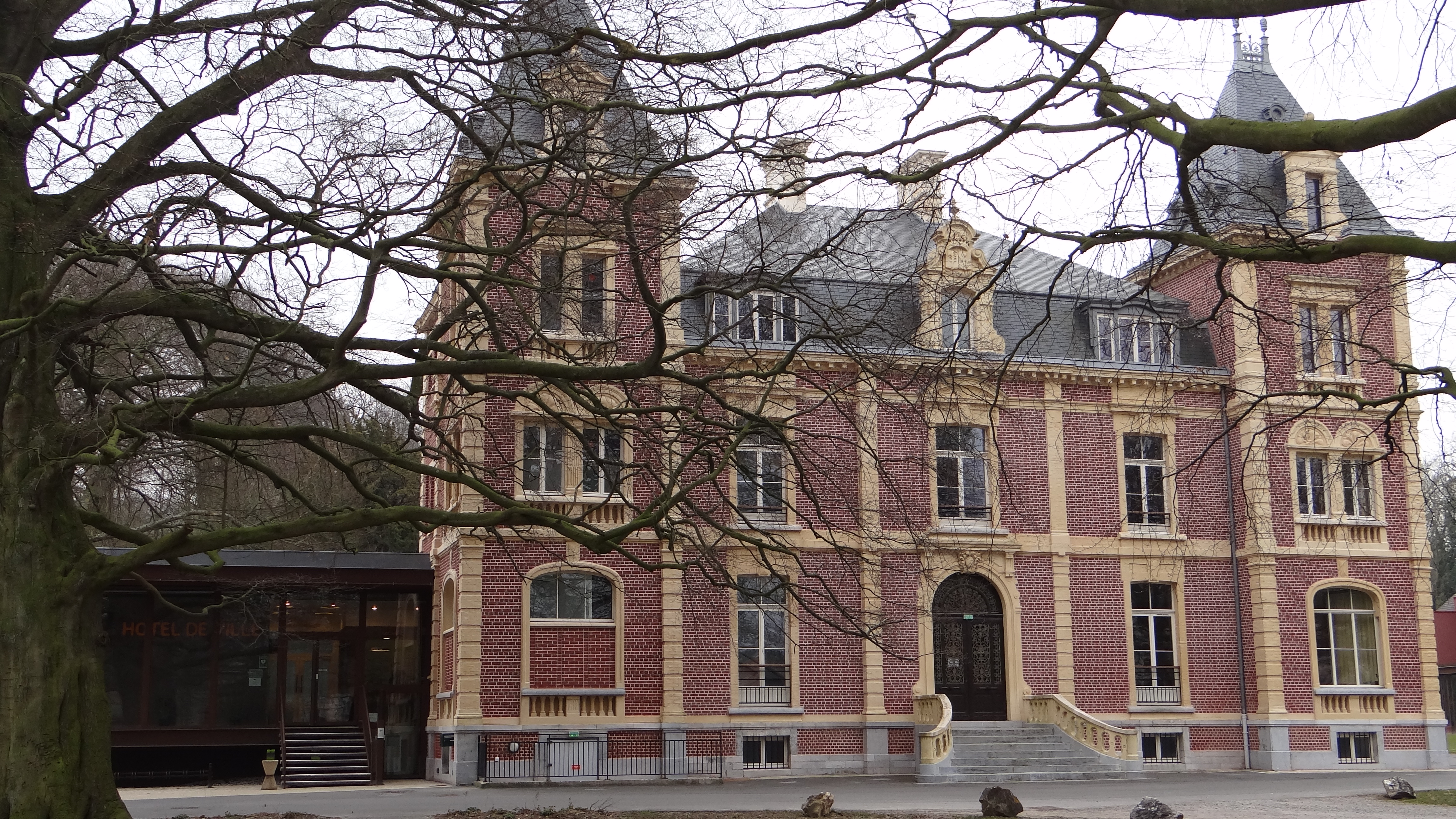 Blendecques Hôtel ville